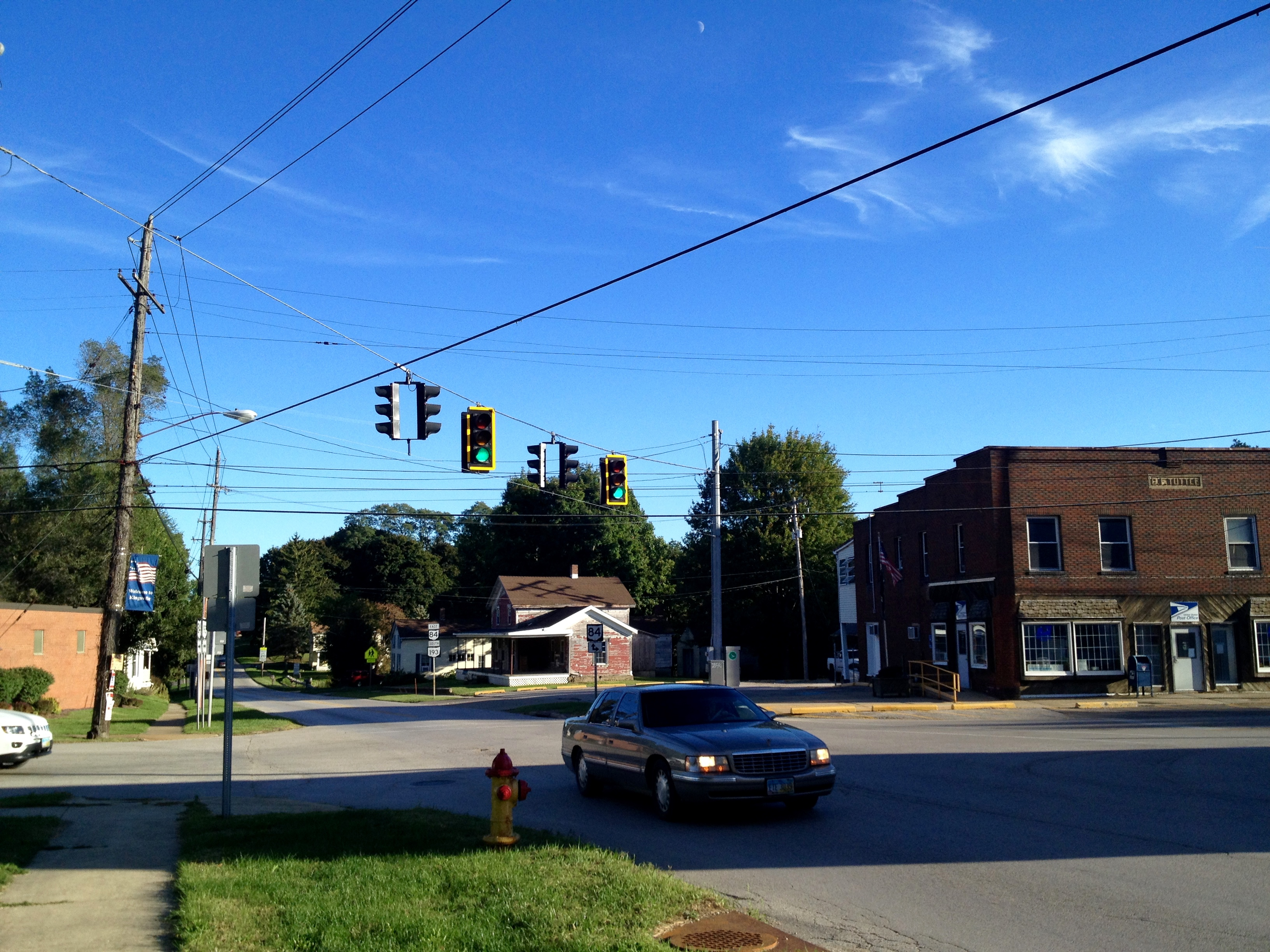 Kingsville, Ohio